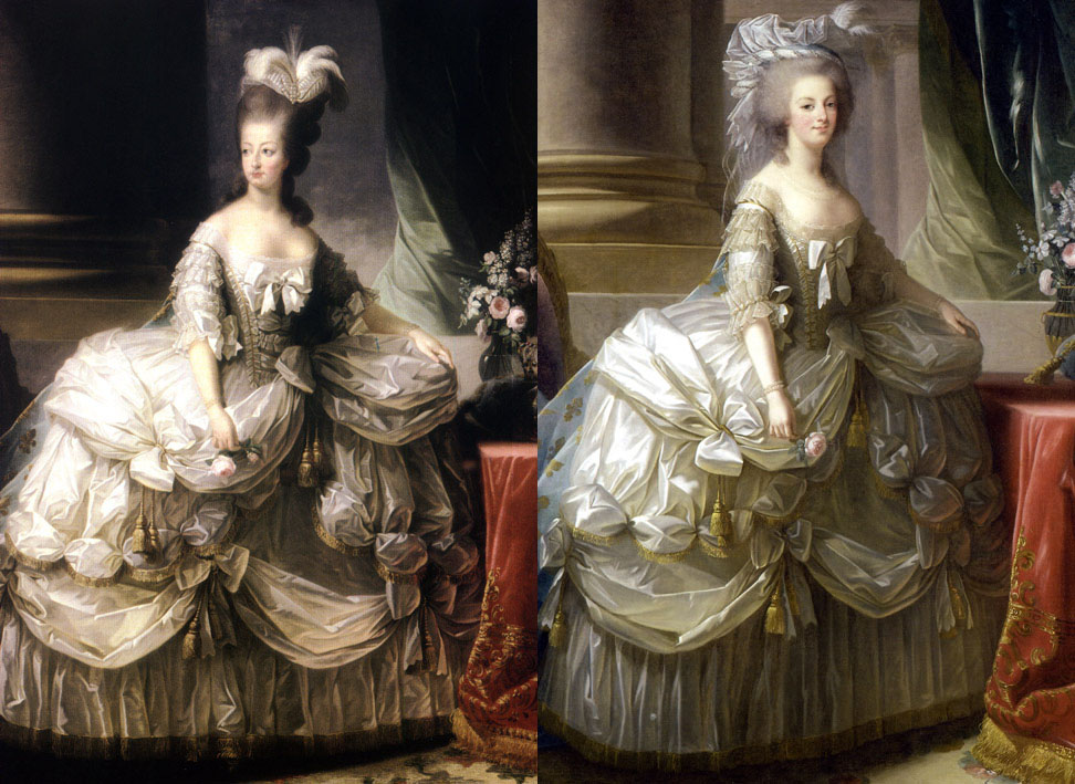 Maria Antonietta in due dipinti di Elisabeth Vigée Le Brun. L'uno (a sinistra) realizzato nel 1778, l'altro (a destra) realizzato nel 1779. Nel secondo ritratto si può notare il nuovo taglio di capelli adottato dopo la nascita della figlia: il parto aveva reso molto più delicata l'attaccatura dei capelli, che quindi non potevano più essere acconciati in maniera elaborata e soprattutto non potevano essere sottoposti a forti stress; venne così creata dal parrucchiere Léonard una nuova acconciatura, appositamente per la regina.